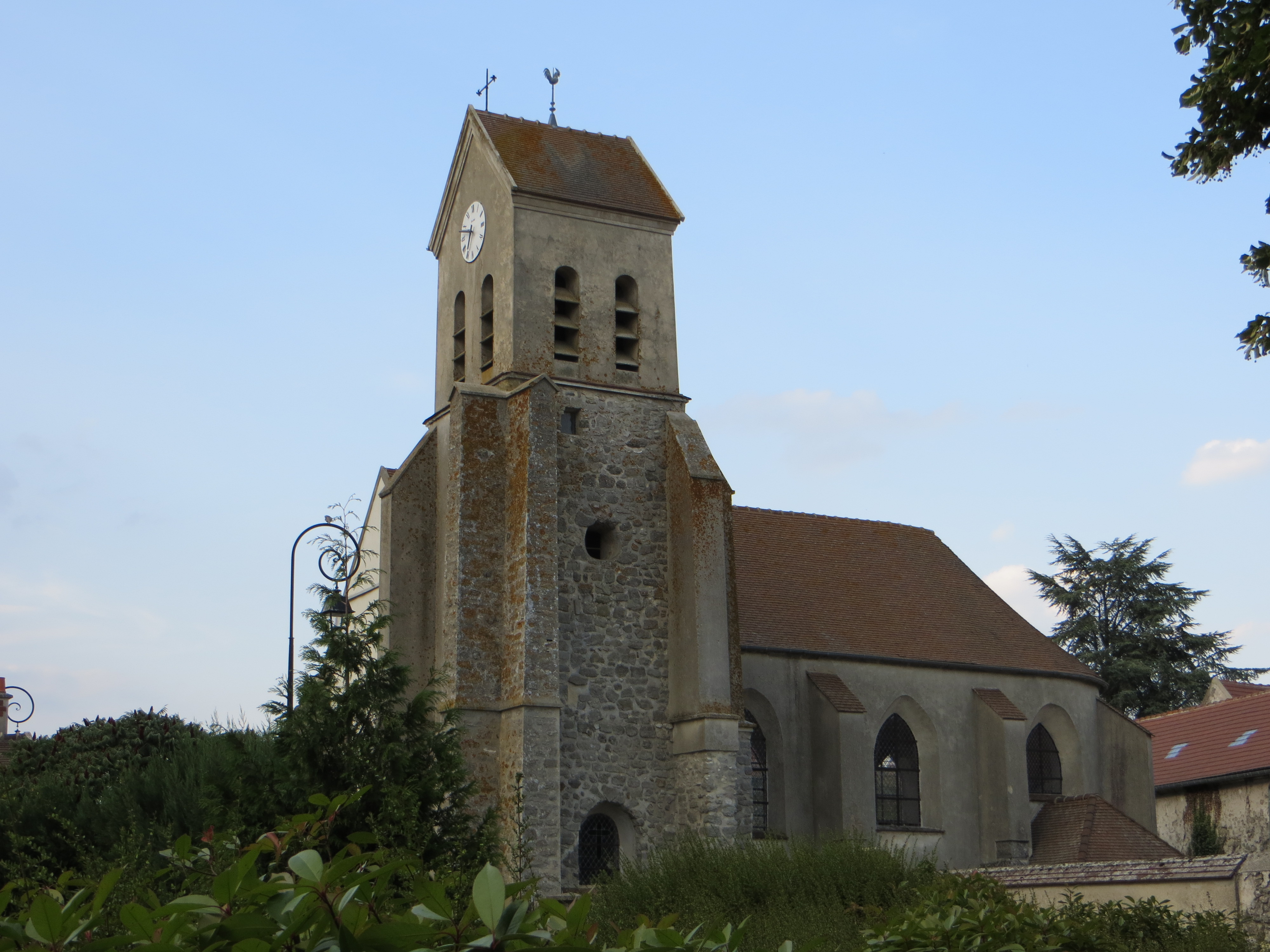 Vue de l'église